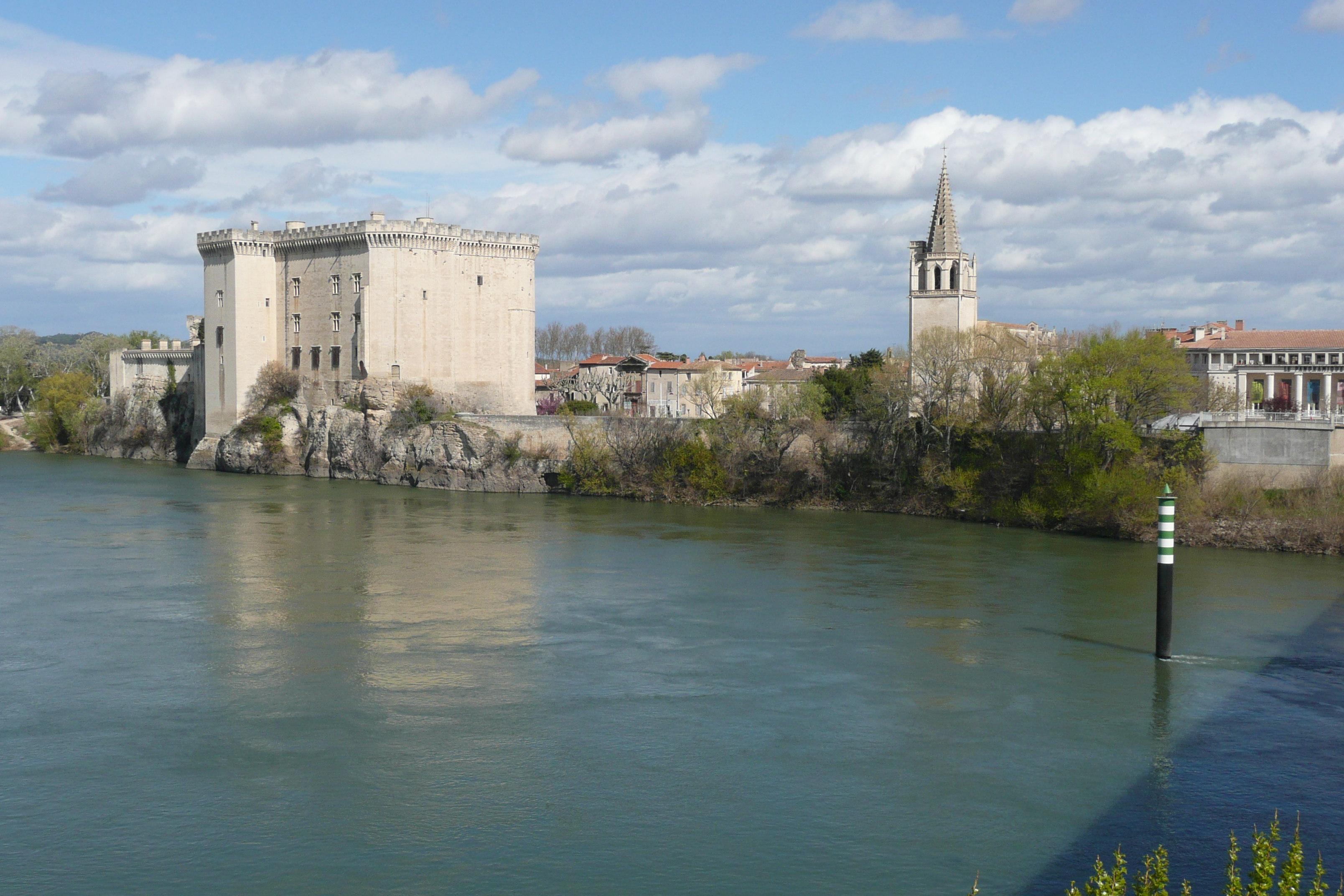 Vue sur le château et l'église depuis le milieu du Rhône (sur le pont) (la ville est Tarascon).